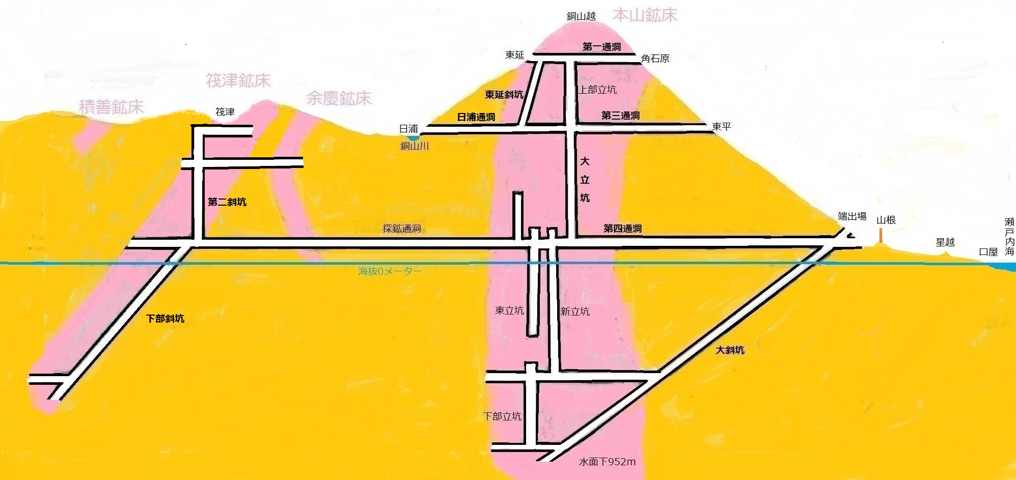 別子銅山の概念図